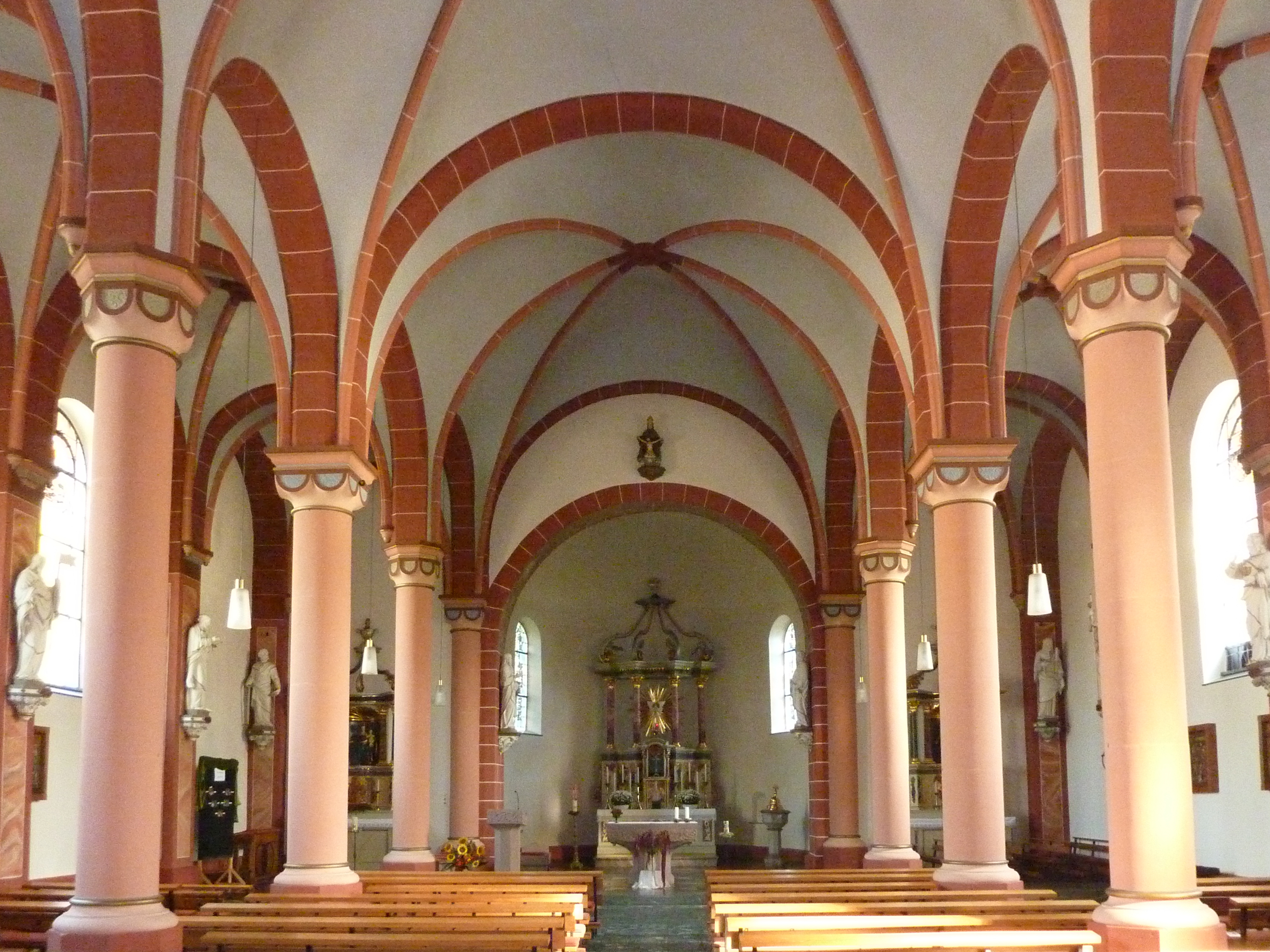 Dahlem, Trierer Str. 1, kath. Pfarrkirche, innen nach O